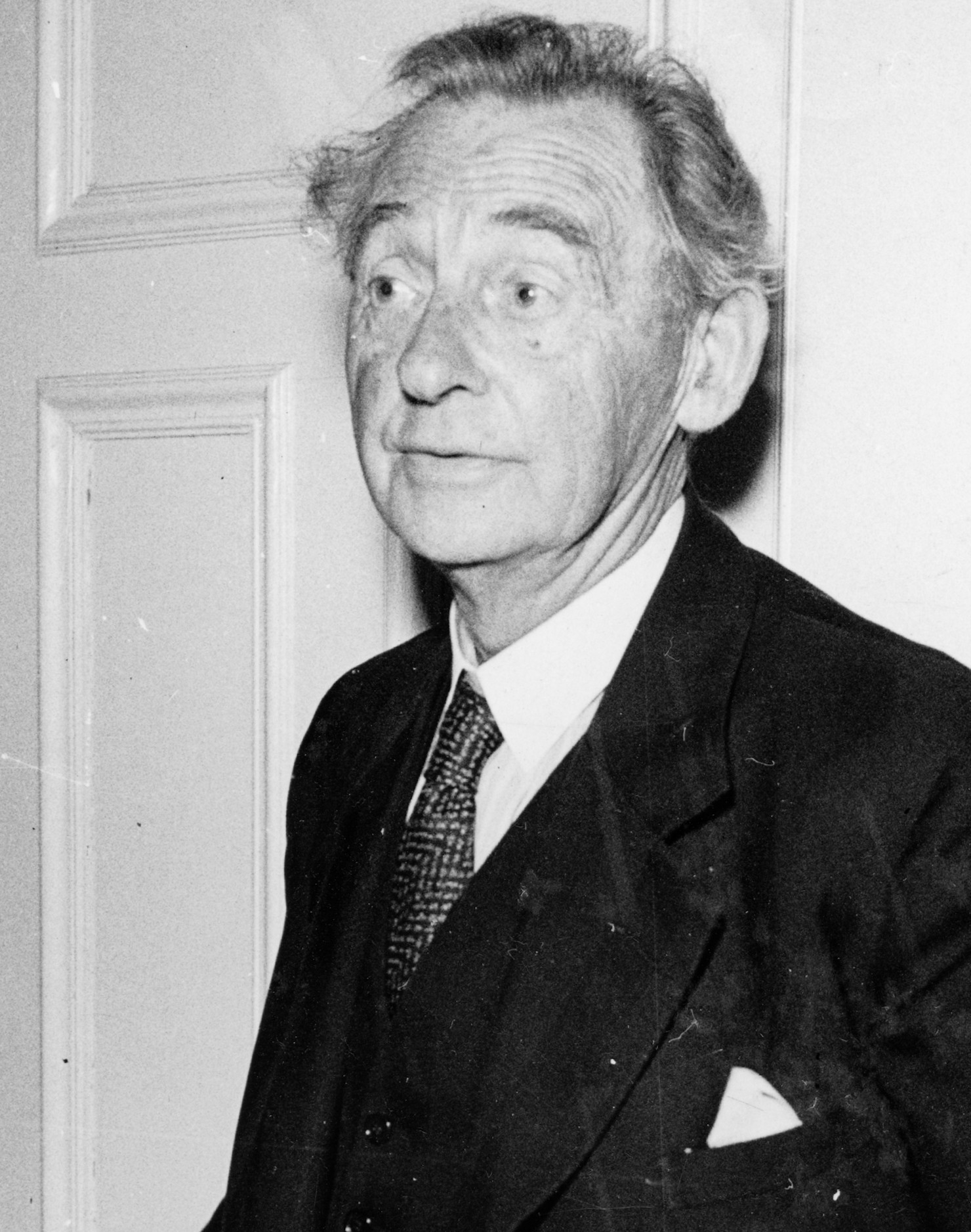 Hovkonstgjutare Herman Bergman håller kåserande föredrag om konstgjutning inför Svenska Uppfinnarföreningens sommarmöte med damer den 8 juni 1945 å restaurang Foresta, Herserud, Lidingö.